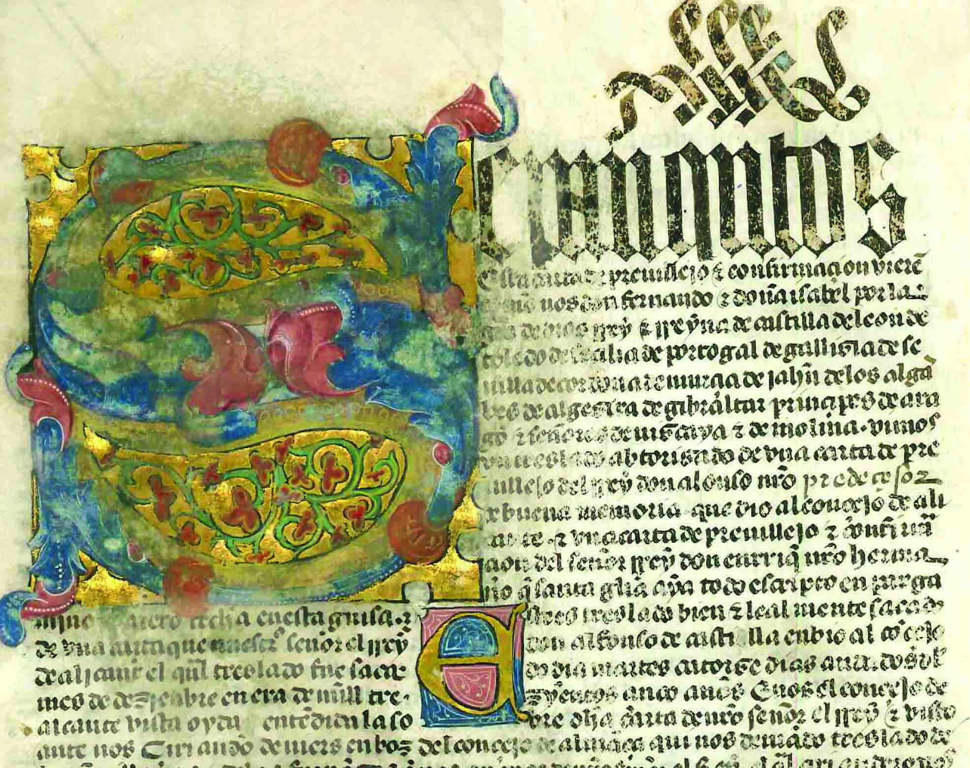 Carta de privilegio y confirmación, capital miniada. Archivo Histórico Provincial de Albacete